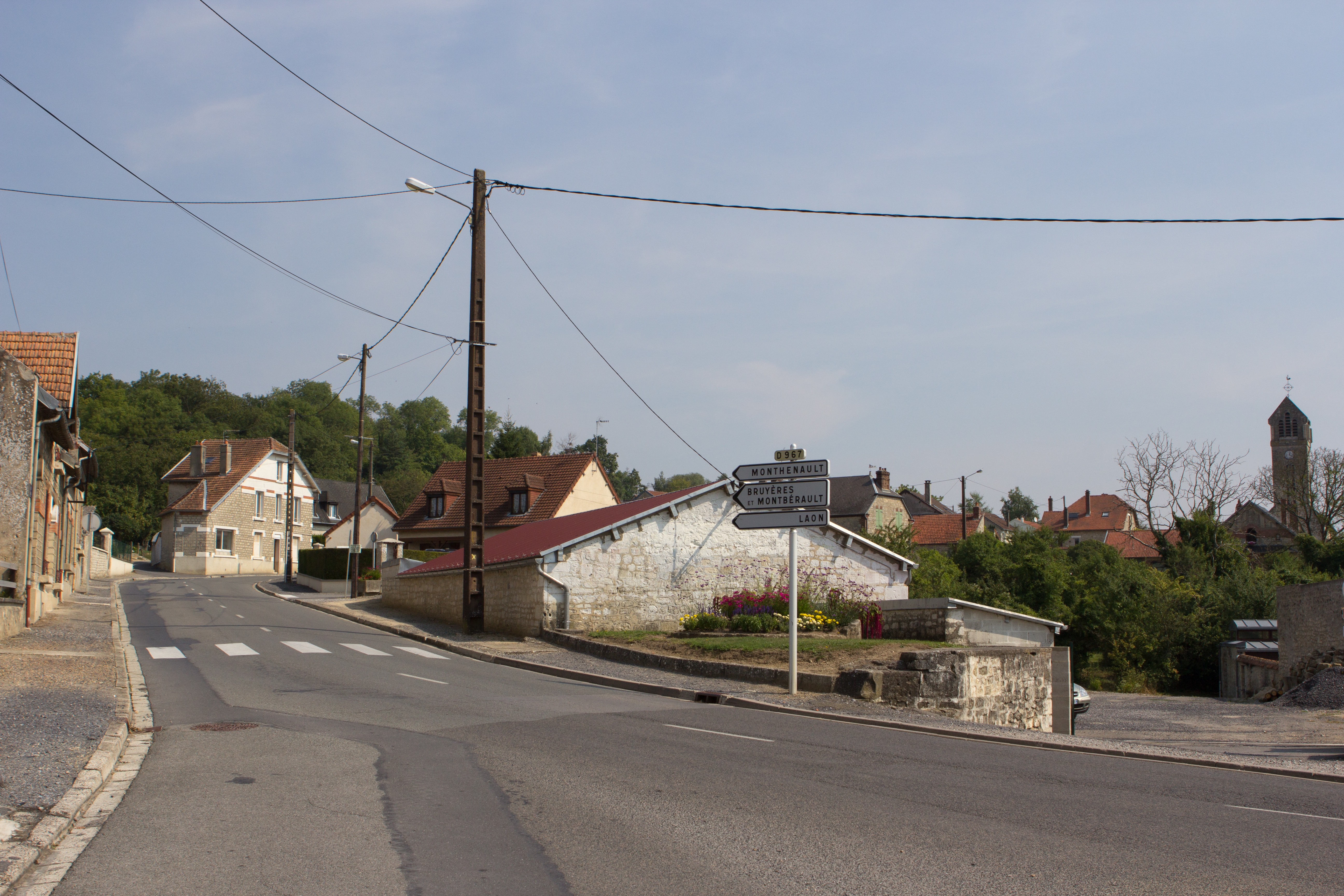 Vue de Chamouille, Aisne, France / (centre ville, rue de Laon, en direction de Monthenault)